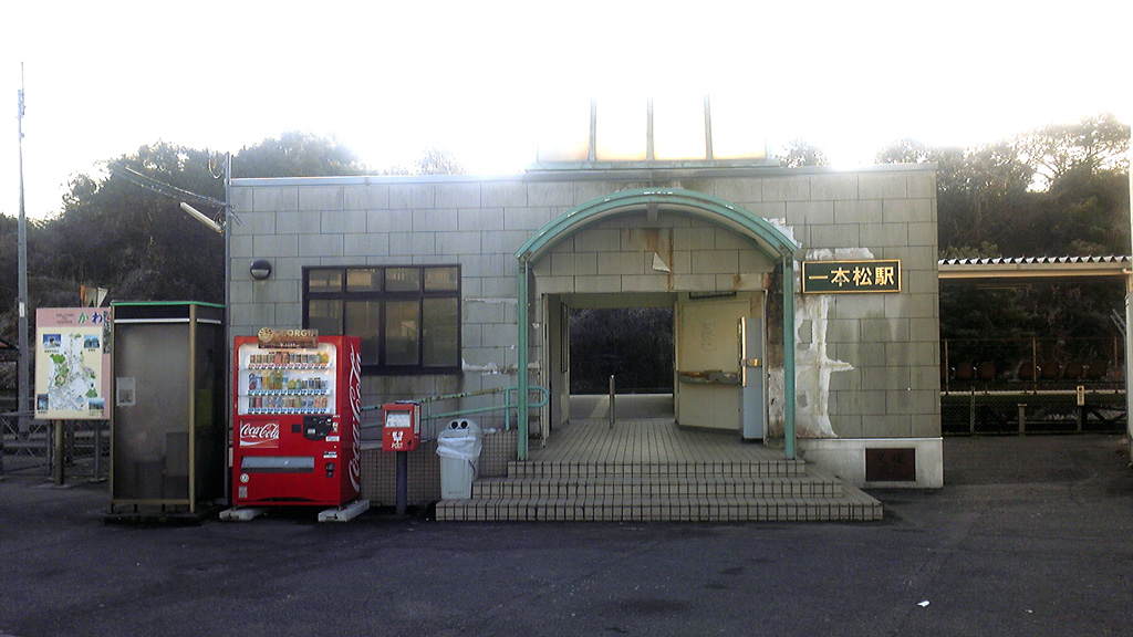 一本松駅駅舎